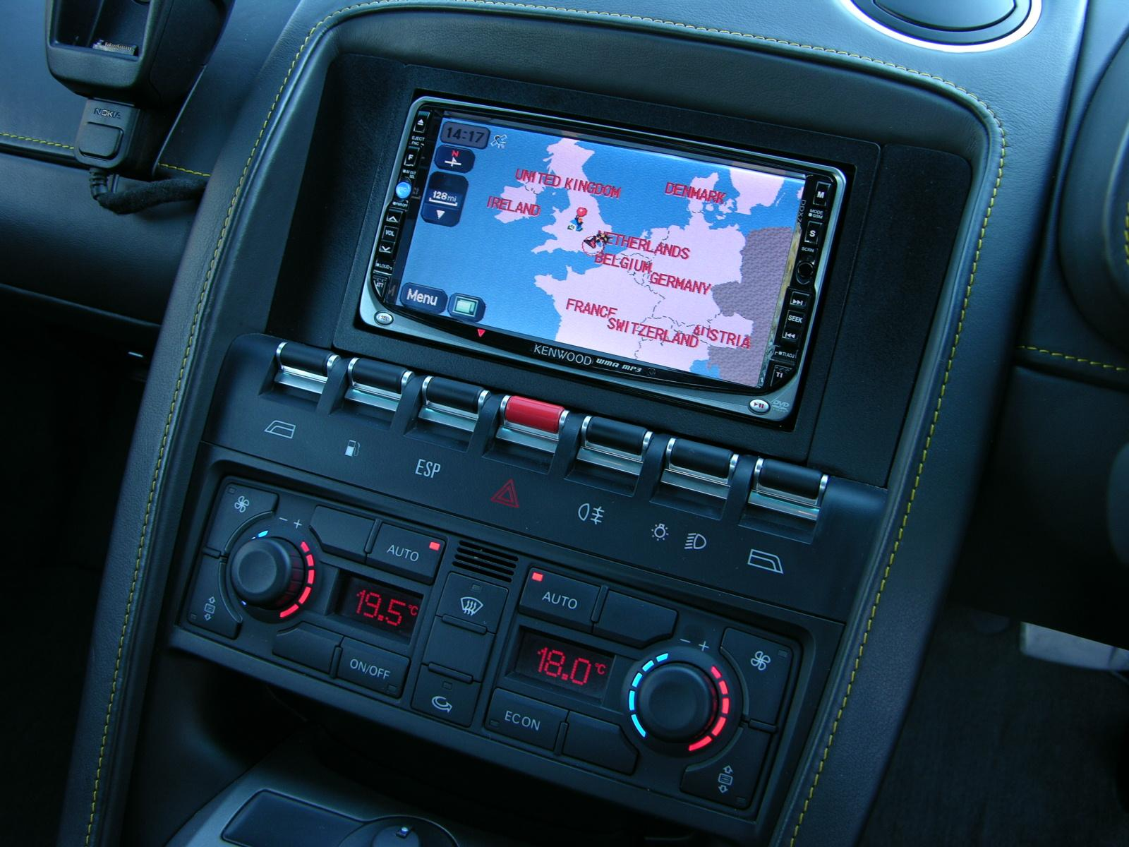 Lamborghini Gallardo Coupe E-Gear